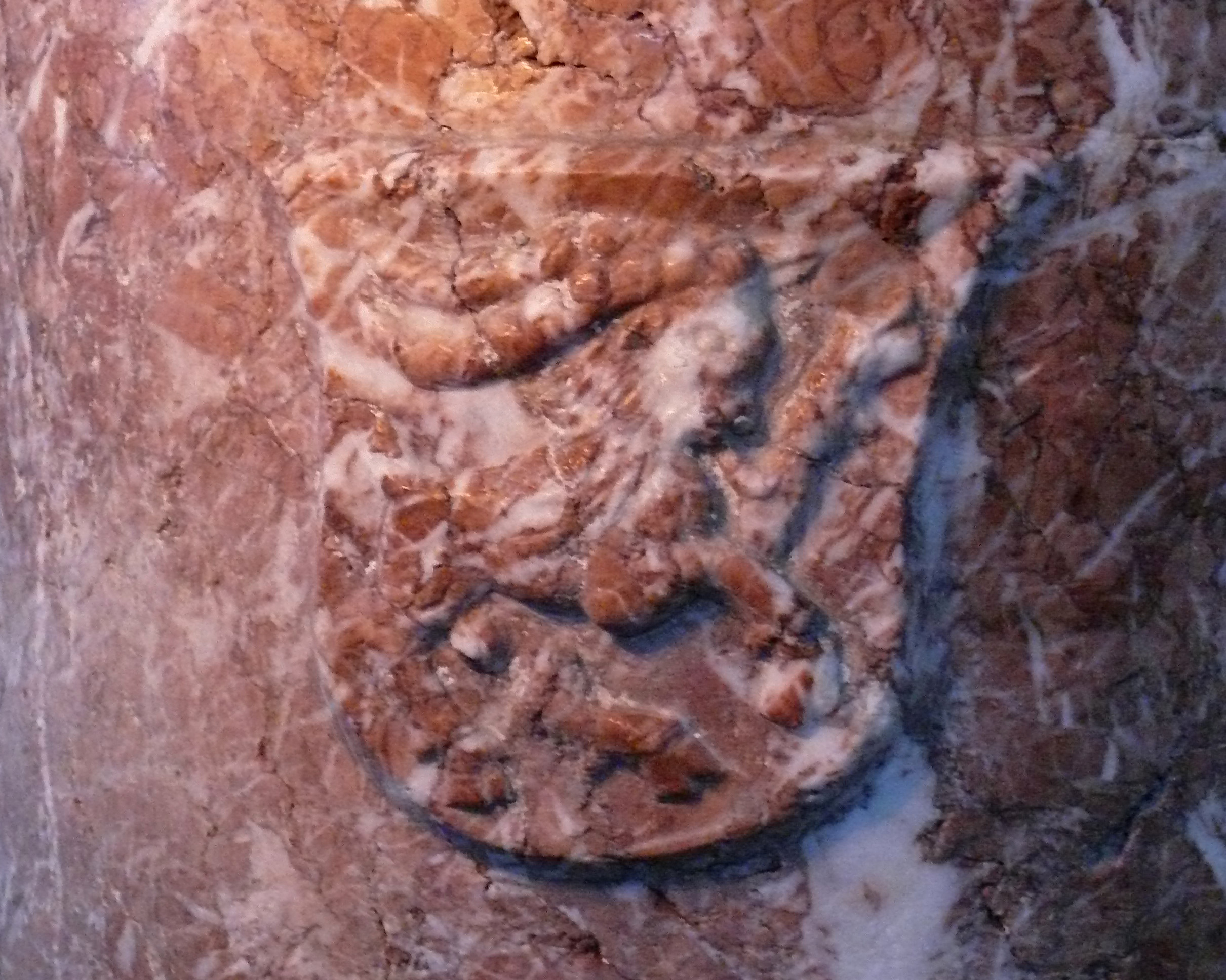 Wappen der Praxedis von Hohenems, Gattin des Peter von Freyberg-Eisenberg, auf einem Rotmarmorstein (Weihwasserkessel). Siehe auch St._Moritz_(Zell)#Ausstattung